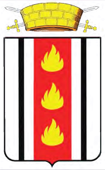 19 февраля 2014 года Муниципальным Советом утверждено новое Положение о гербе внутригородского образования Санкт-Петербурга города Колпино. В гербе отражено присвоение городу почетного звания "город воинской славы" - за муниципальной короной добавлены два скрещенных меча. "В серебряном щите червленый столб, обремененный тремя золотыми пламенами и сопровождаемый двумя черными узкими столбами. Щит увенчан золотой башенной короной без зубцов. За короной - знак города воинской славы: два серебряных с золотыми рукоятями меча, положенных накрест".